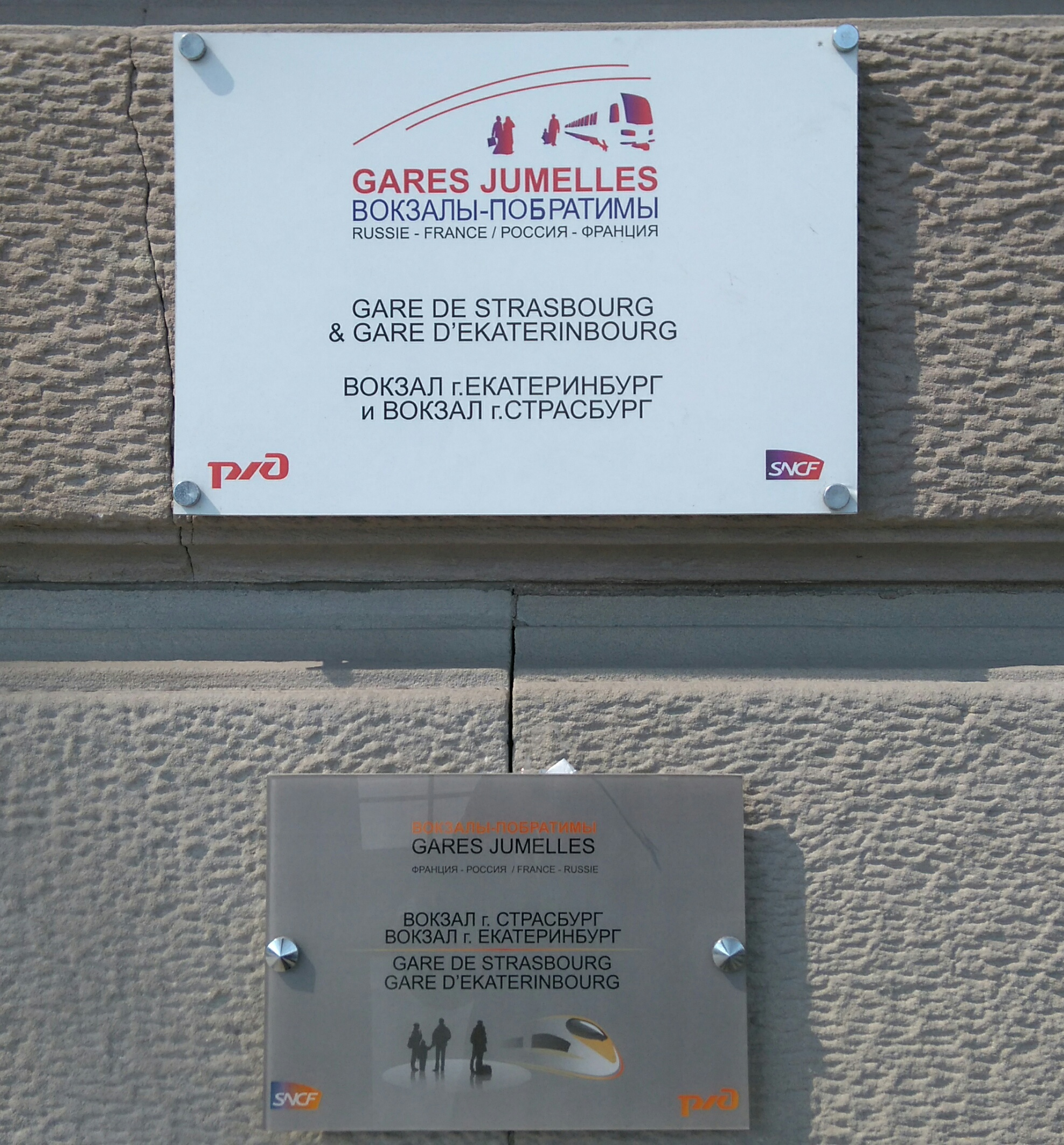 Plaque commémorative Gares jumelles Strasbourg - Iekaterinbourg.